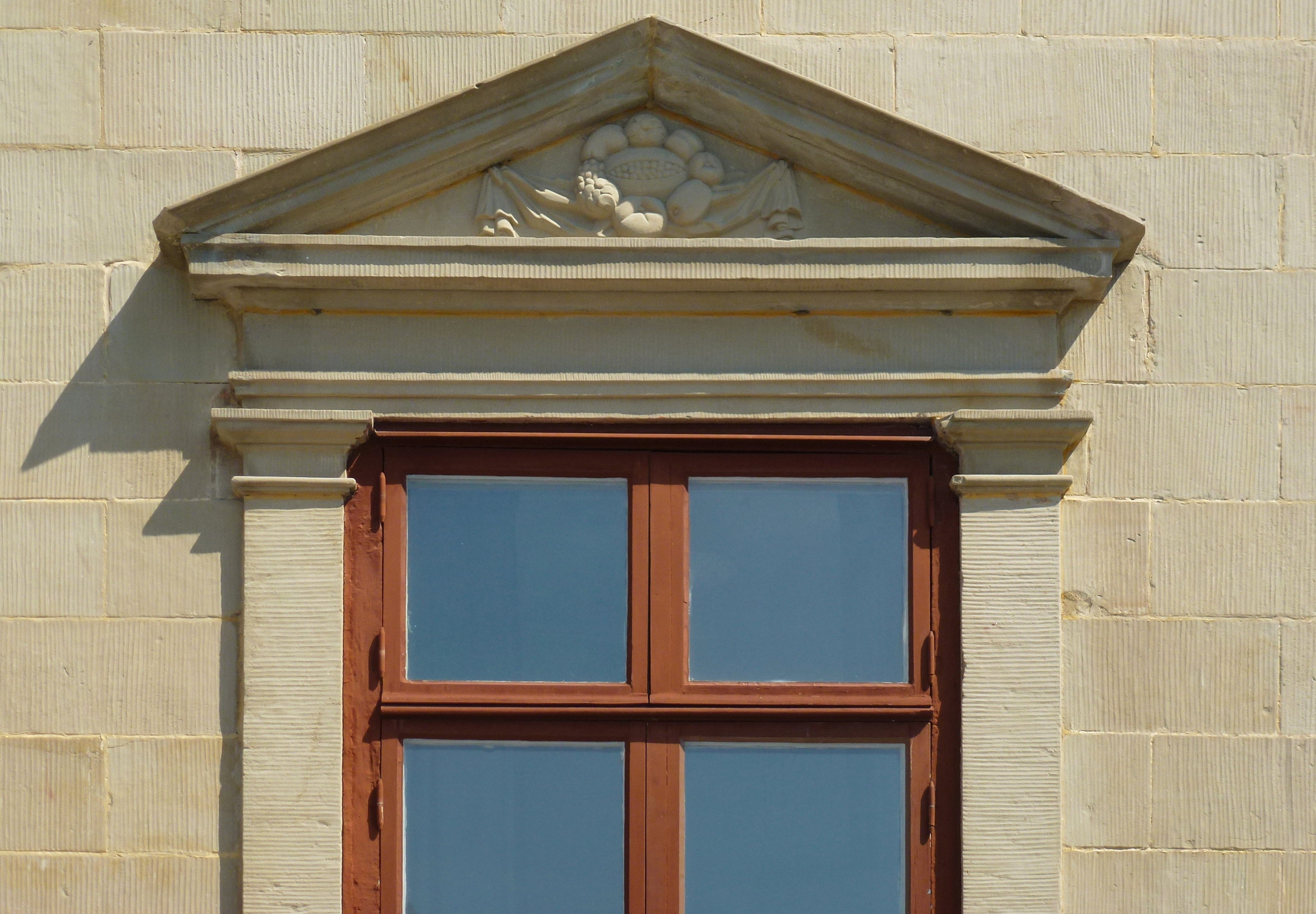 Görvälns slott, fönster- och fasaddetalj